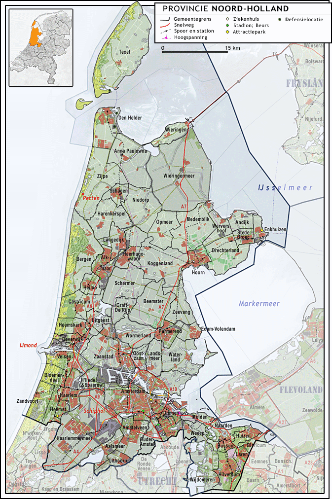 Provincie Noord-Holland, indeling van gemeenten (2009) en impressie van het landschap. Jan-Willem van Aalst, samengesteld uit publiek beschikbare geo-data: Referentie-ondergrond (kustlijn, steden, wegen) gerasterd uit de OpenStreet Map OSM. ( Inhoud is beschikbaar onder de Creative Commons Attribution-ShareAlike 3.0 license. Referentie-ondergrond op water bewerkt vanuit Gebruik is vrij met bronvermelding NLR en ESA. Vectorgrenzen van gemeenten en regio's vrij ter beschikking gesteld met dank aan cartografen van brandweerregio's Hollands-Midden en IJssel-Vecht; gerasterd in Photoshop. BRZO locaties op basis van de provinciale risicokaart, Defensie locaties op basis van de lijst op Overige kenmerken op de kaart: eigen tekenwerk van Jan-Willem van Aalst, op basis van gerasterde gemeentegrenzen.